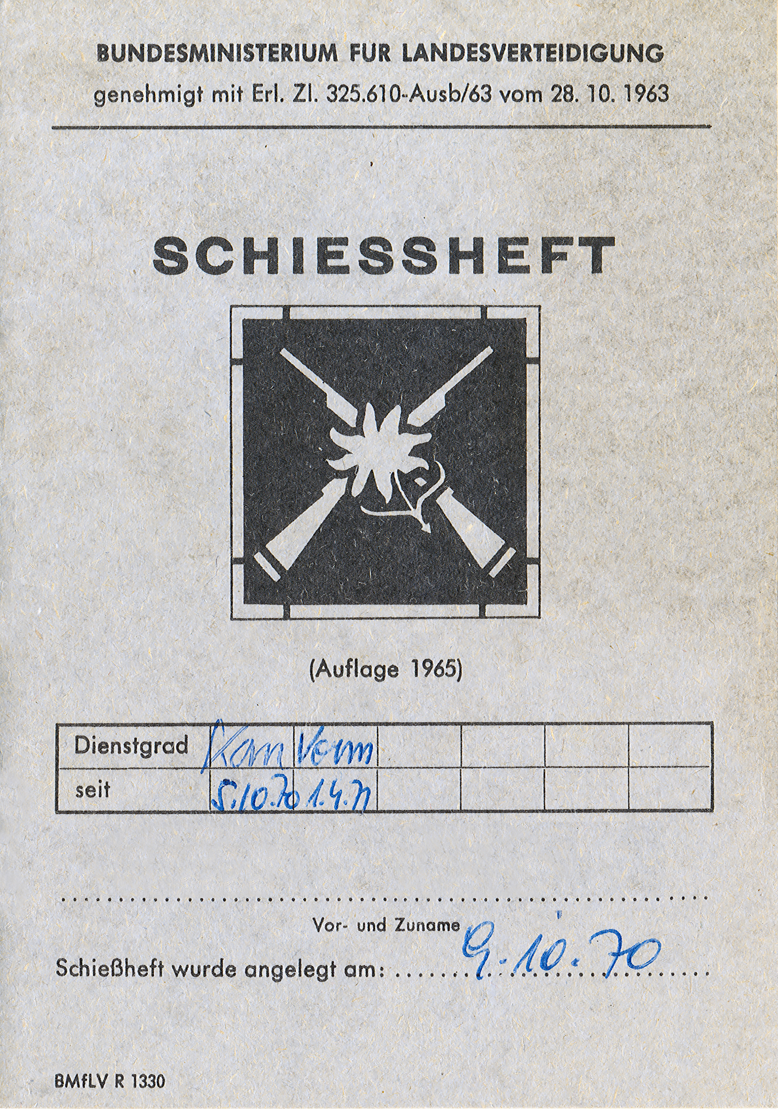 Schießbuch